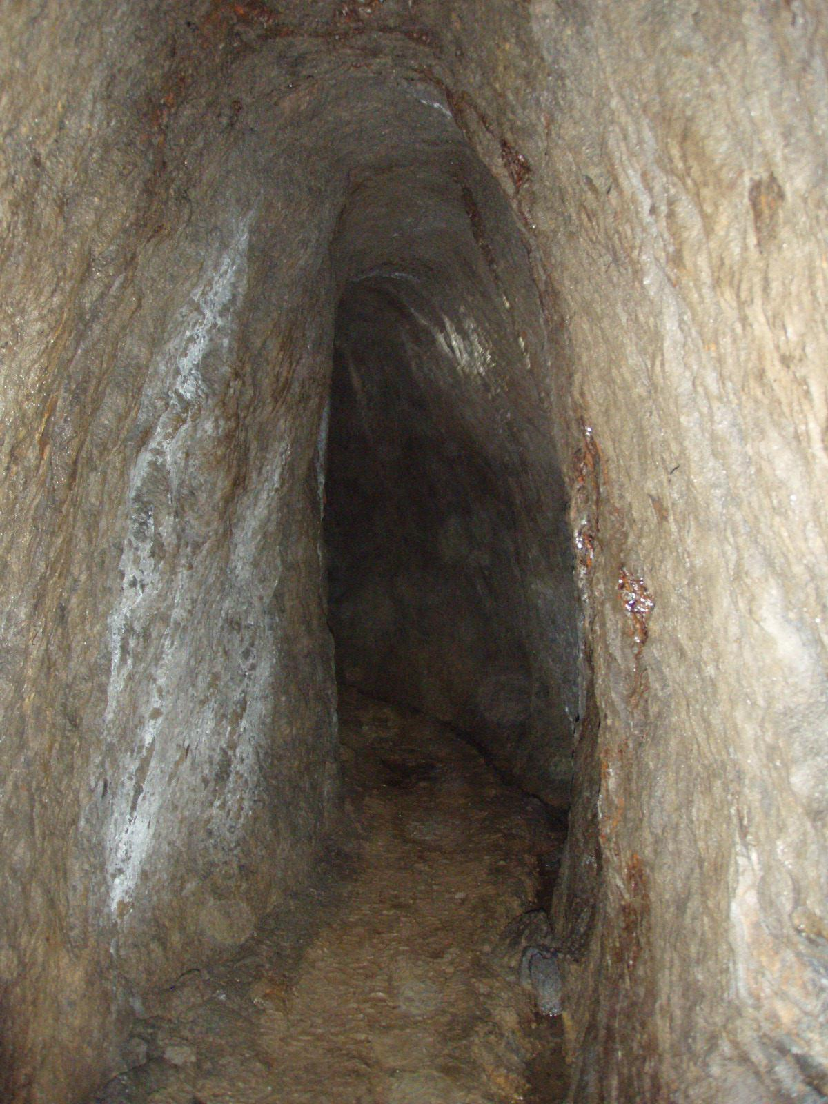 Stollenstrecke untertage, Grube Stahlberg, Hilchenbach, Siegerland